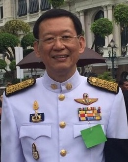 ไพบูลย์ นิติตะวัน อดีตสมาชิกวุฒิสภา และแกนนำผู้ก่อตั้งกลุ่ม40สว.